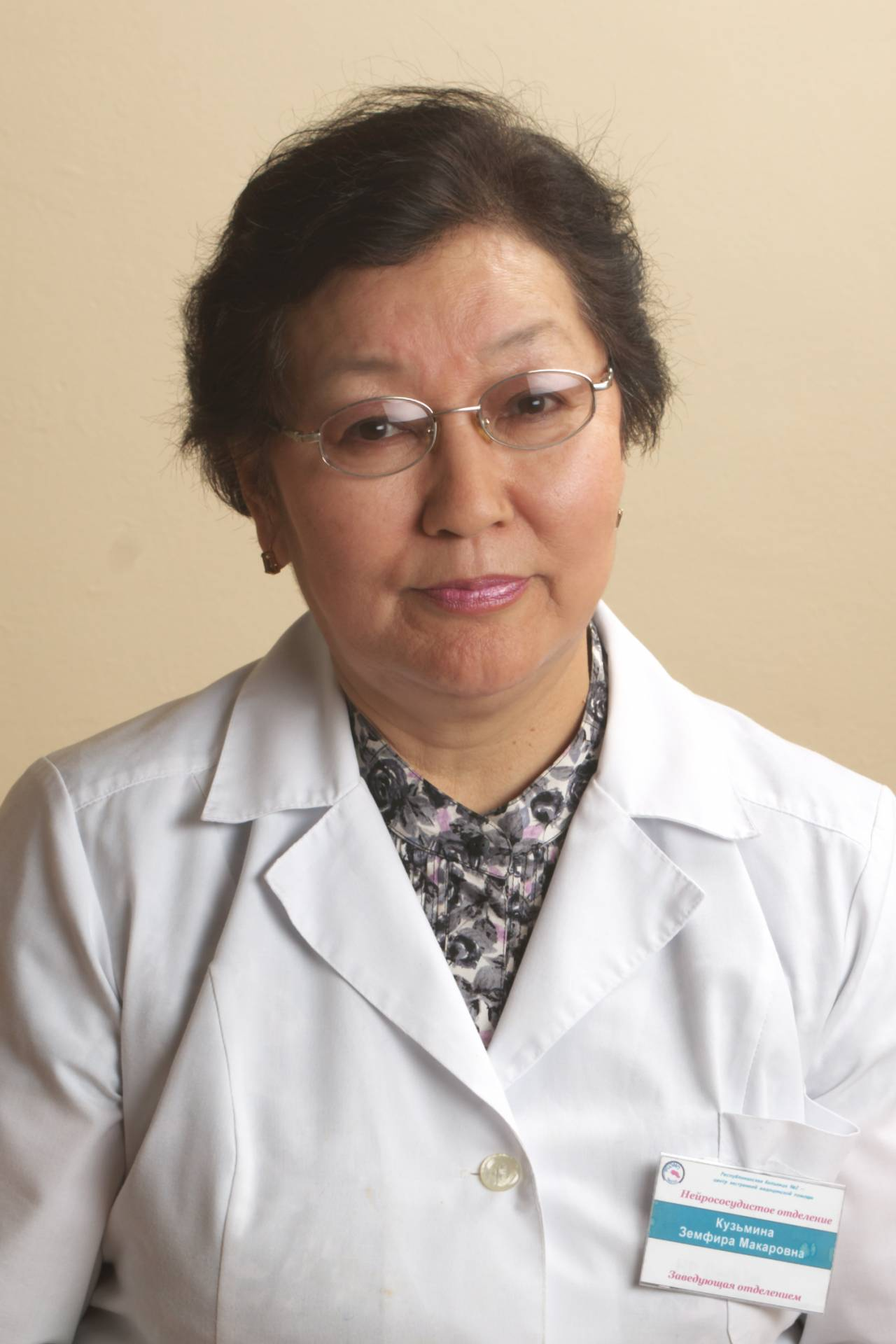 Земфира Макаровна Кузьмина награждена всероссийской премией «Время Жить!» за личный вклад в борьбу с инсультом.